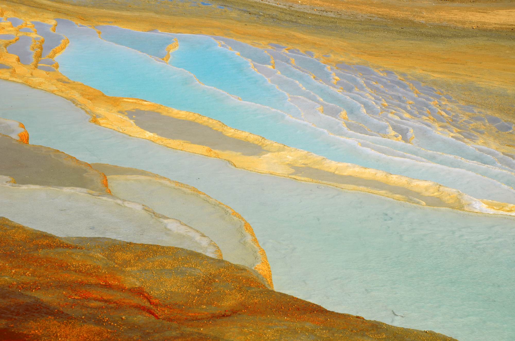 Badab Sort springs